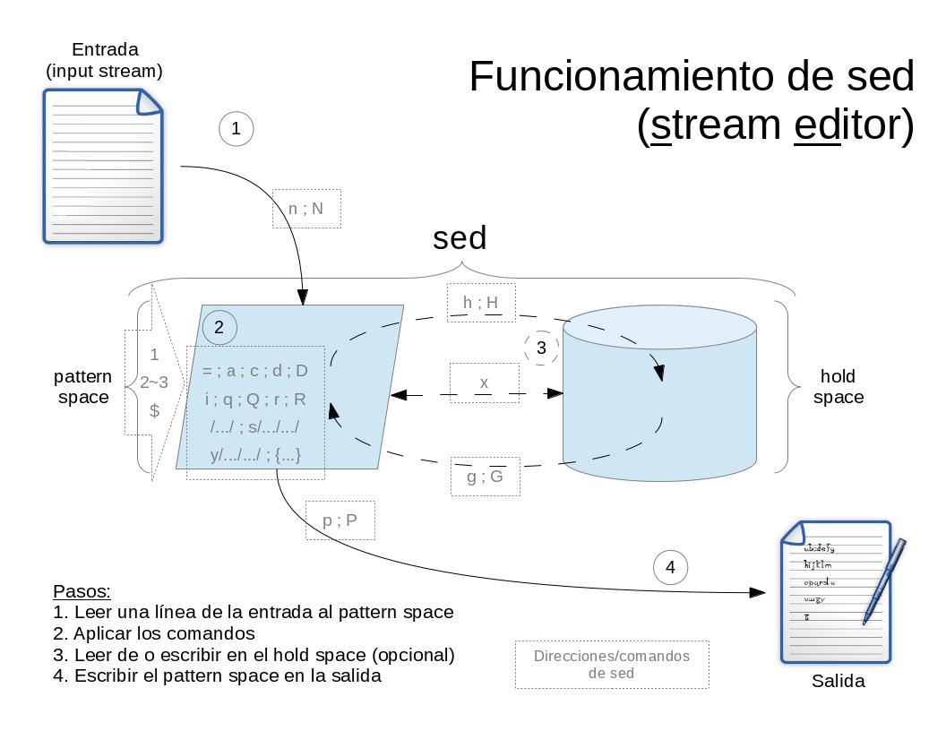 Se muestra de forma general el funcionamiento del comando sed